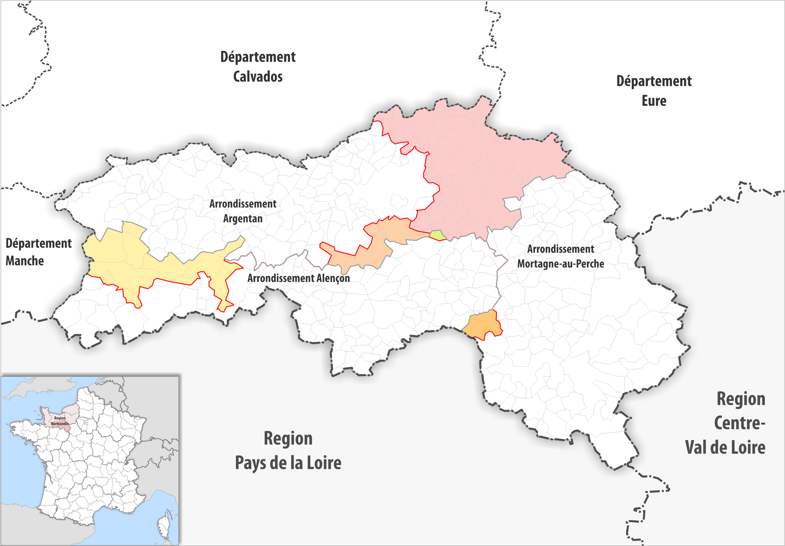 Arrondissements Anpassungen auf 2017 im Departement Orne